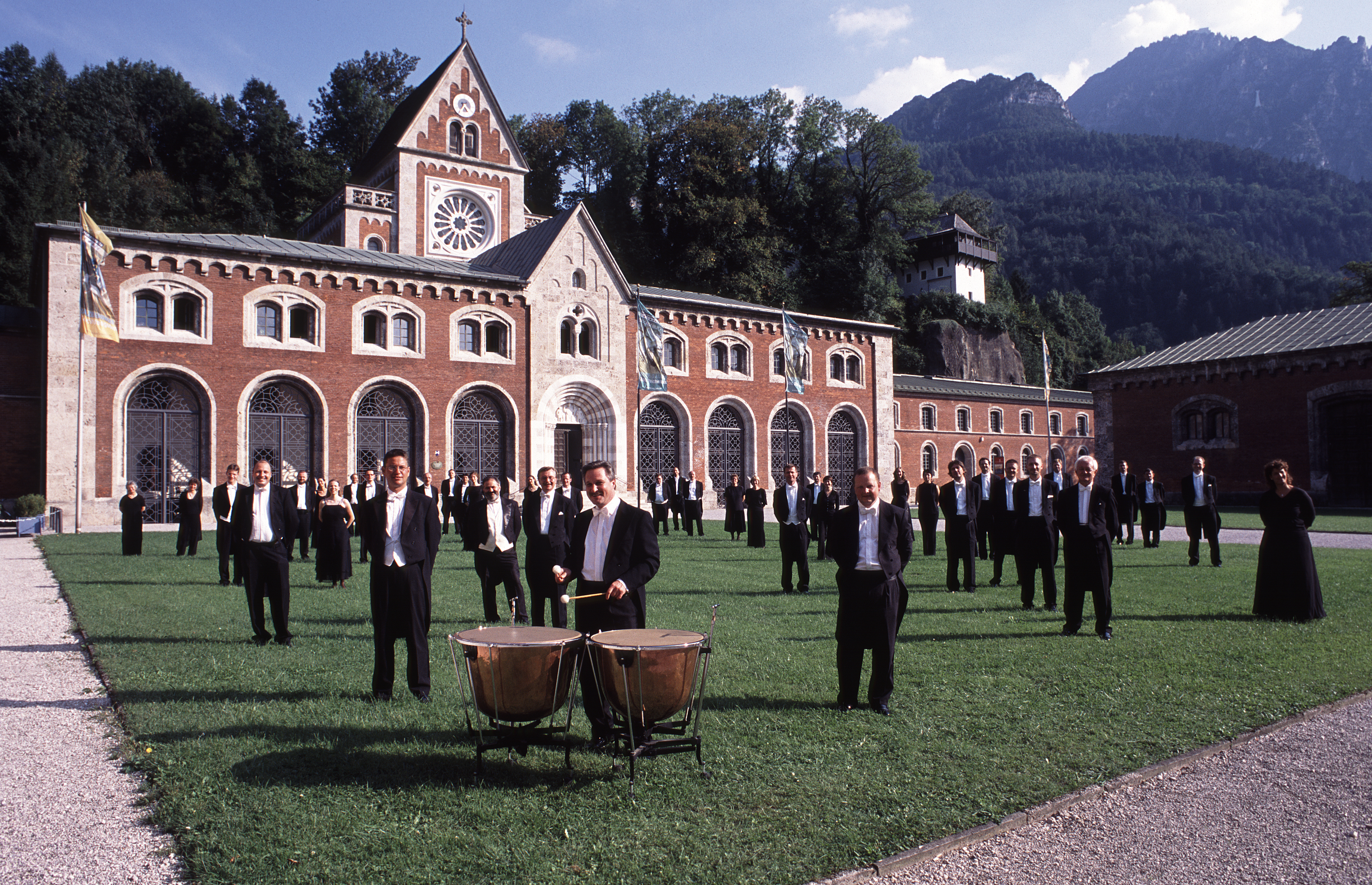 Bad Reichenhaller Philharmonie vor der Alten Saline